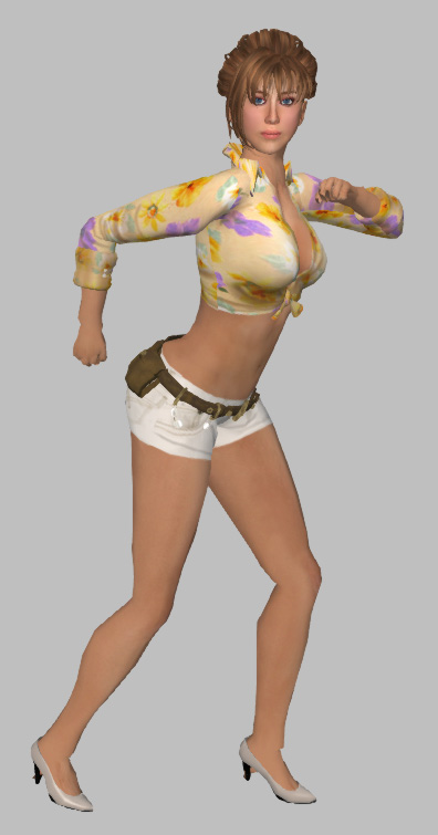 MAX の「Tacata'」のダンスポーズ